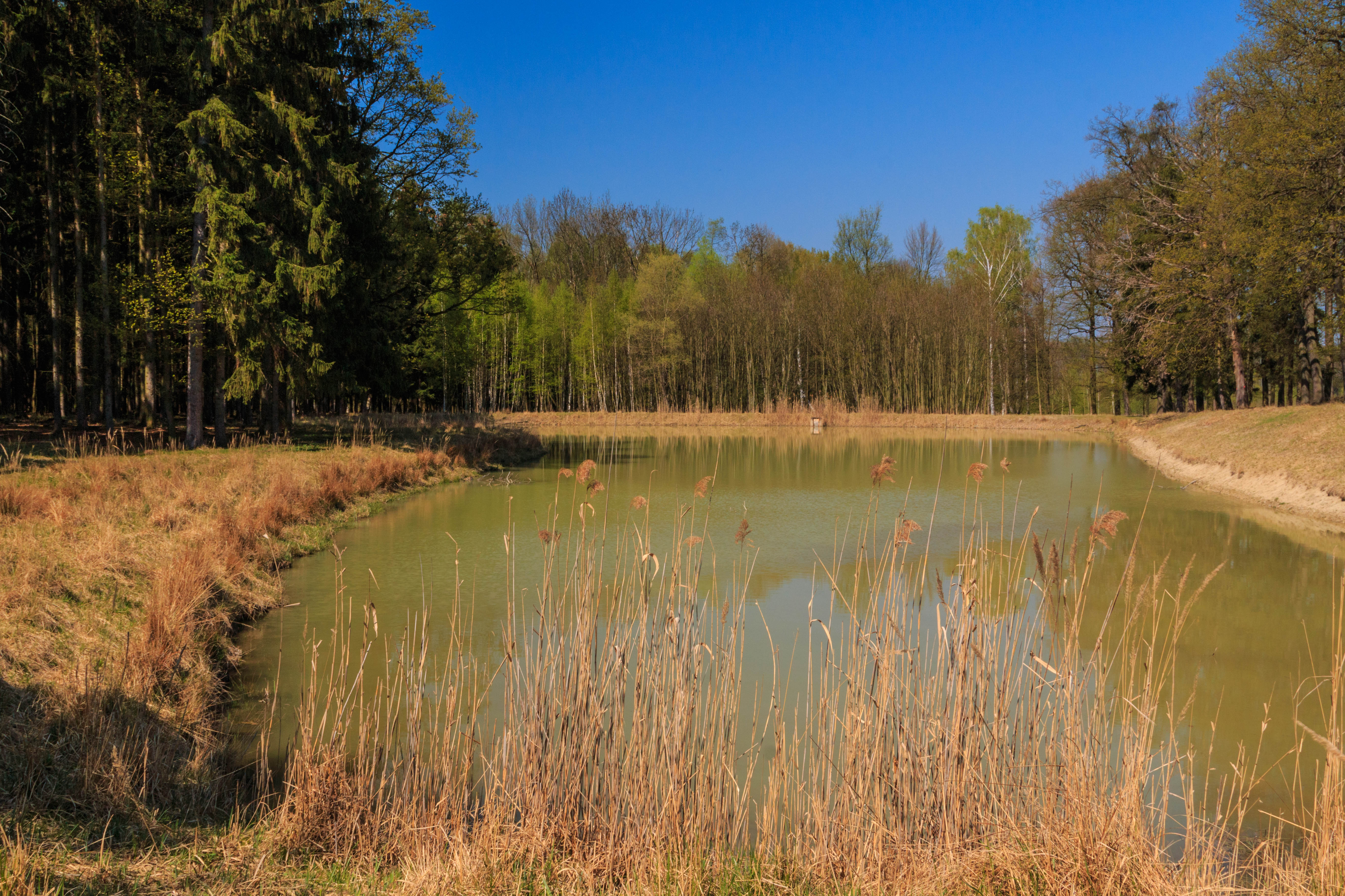 Čihadelské rybníky Project: Vodstvo.